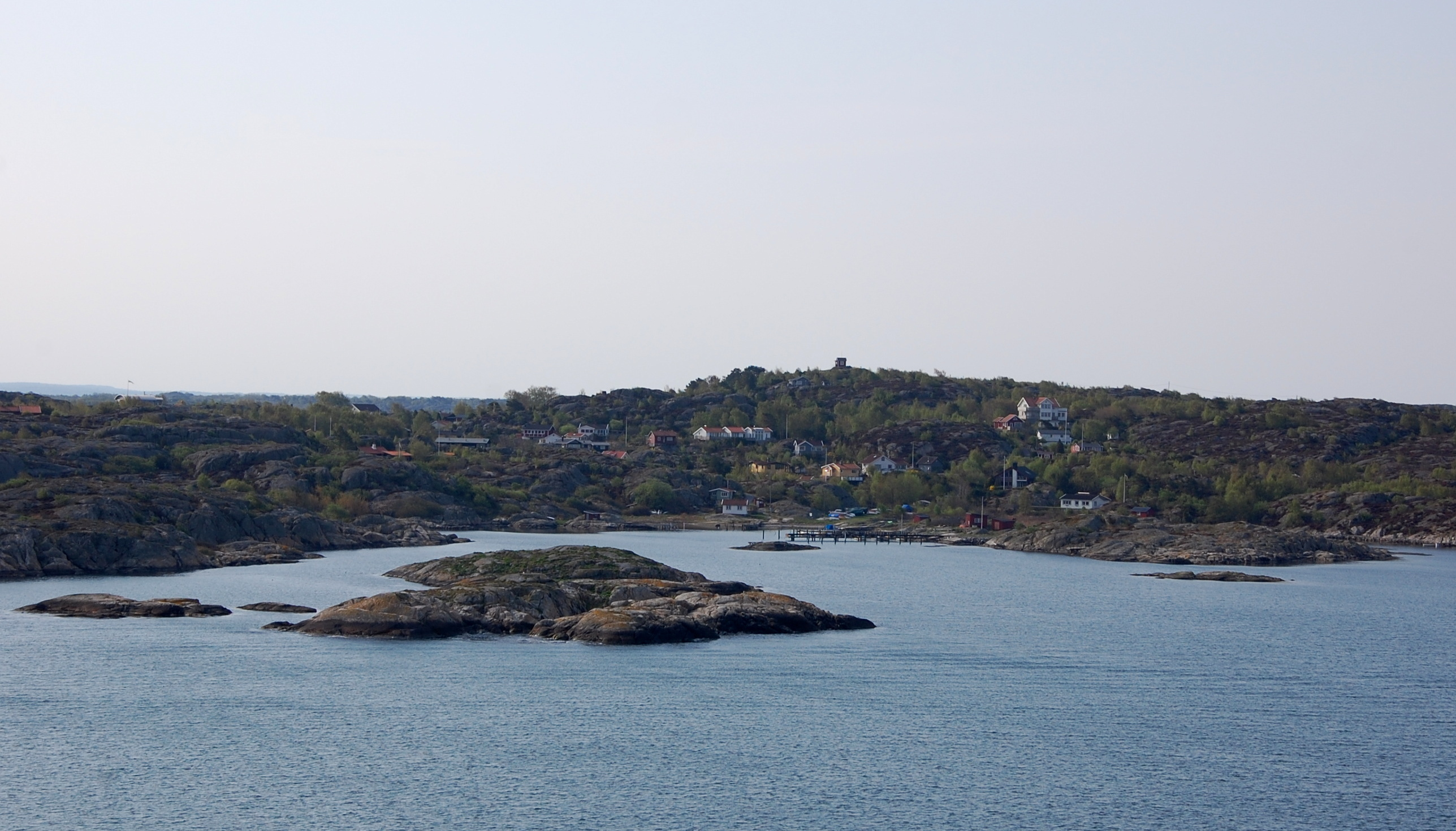 Insel im Schärengarten vor Göteborg